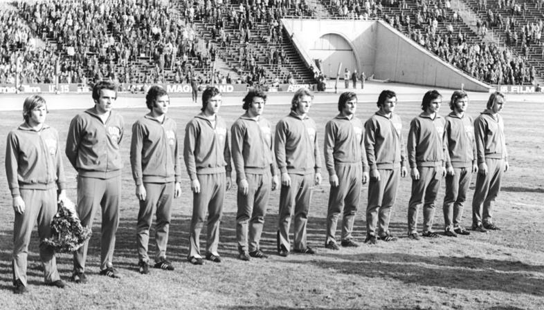 ADN-ZB-Gahlbeck-29.10.75-str-Leipzig: Die Fußball-Nationalmannschaft der DDR vor dem EM-Spiel der Gruppe 7 am 12.10.75 in Leipzig. Gegen die französische Auswahl traten folgende Spieler an: v.l. Kapitän Hans-Jürgen Dörner, Torwart Jürgen Croy, Hartmut Schade, Gerd Weber, Eberhard Vogel, Joachim Fritsche, Peter Ducke, Reinhard Lauck, Rainhard Häfner, Konrad Weise und Hans-Joachim Streich.